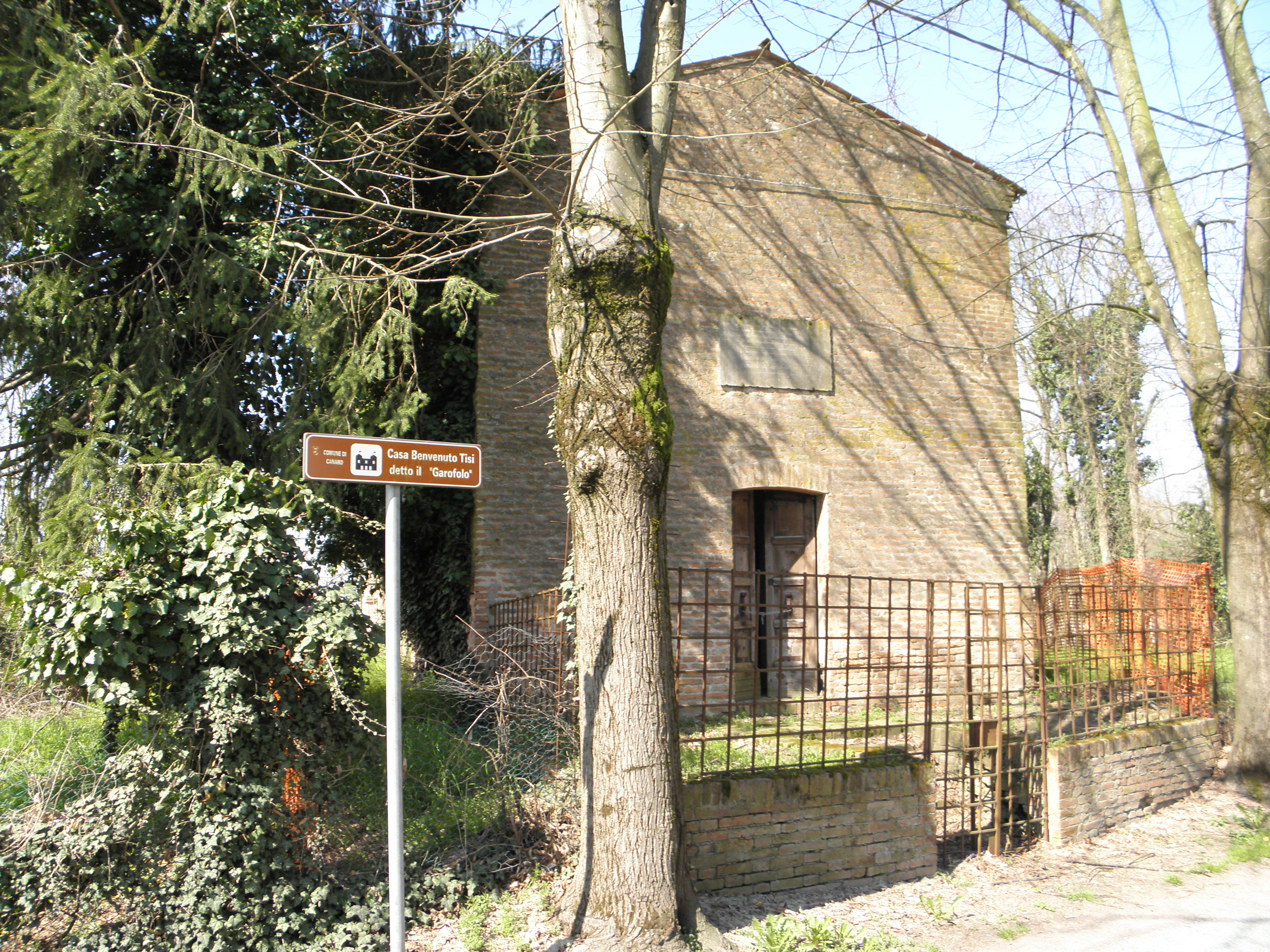 Garofolo, frazione di Canaro, provincia di Rovigo: abitazione attribuita a quella natia di Benvenuto Tisi, detto il Garofalo.